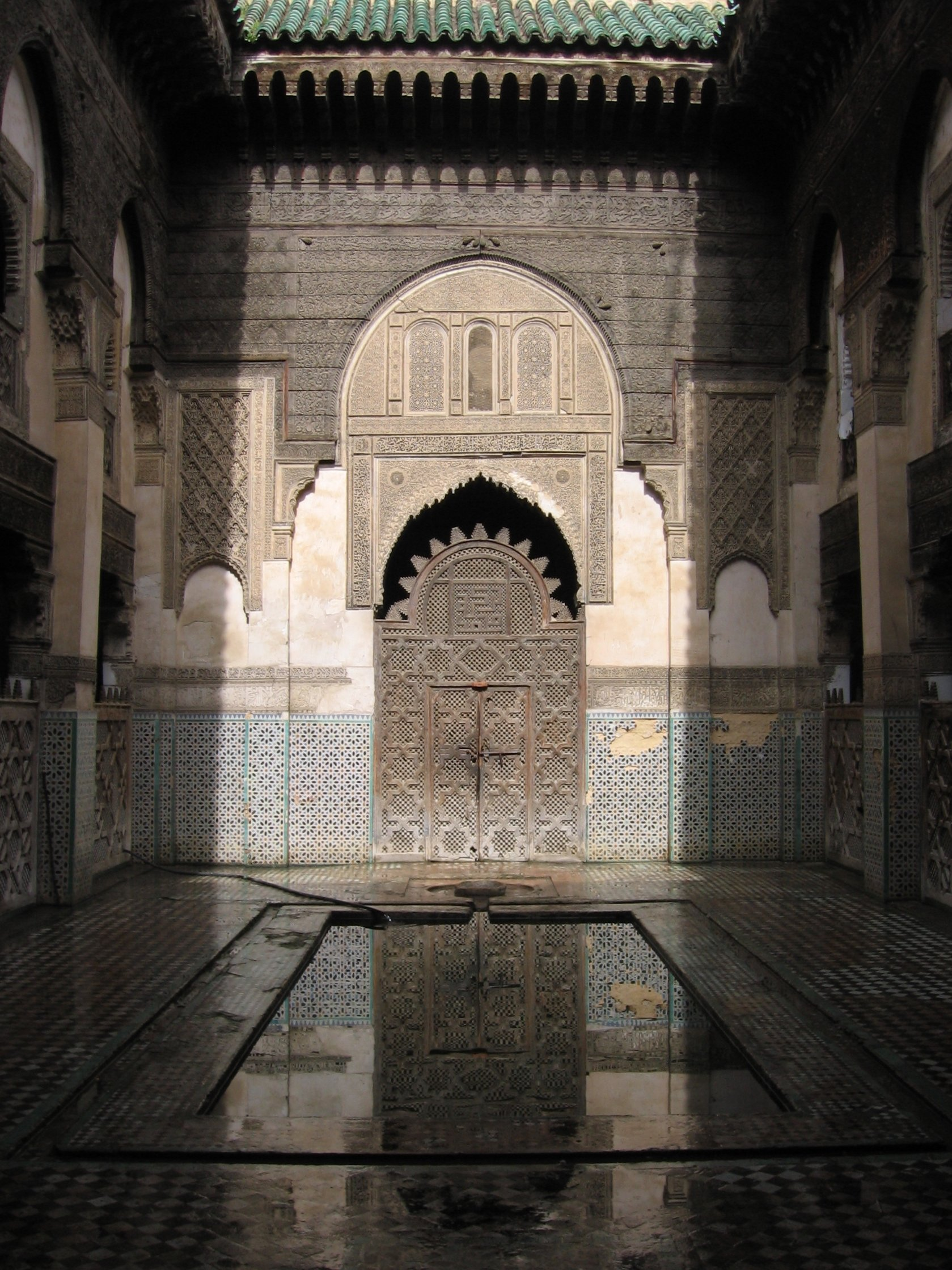 Medersa Sahrij, Fès (Maroc) en 2008.